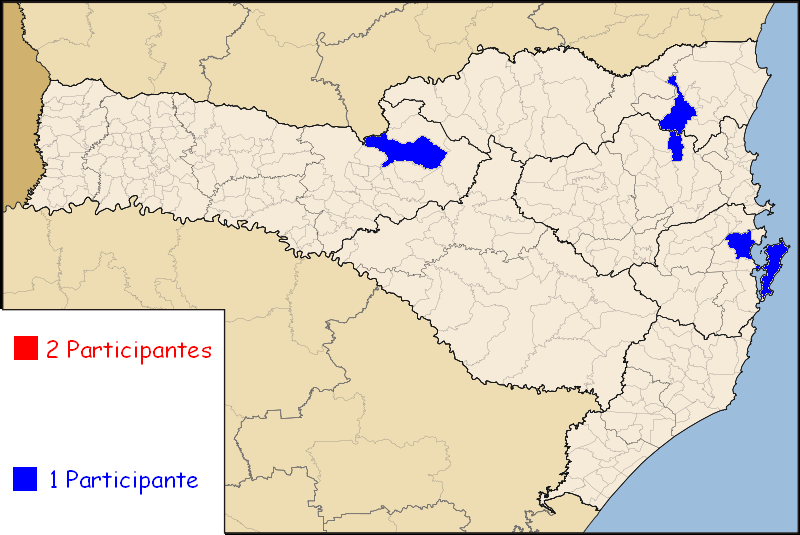 Mapa das cidades participantes do Campeonato Catarinense de Futebol Feminino 2011